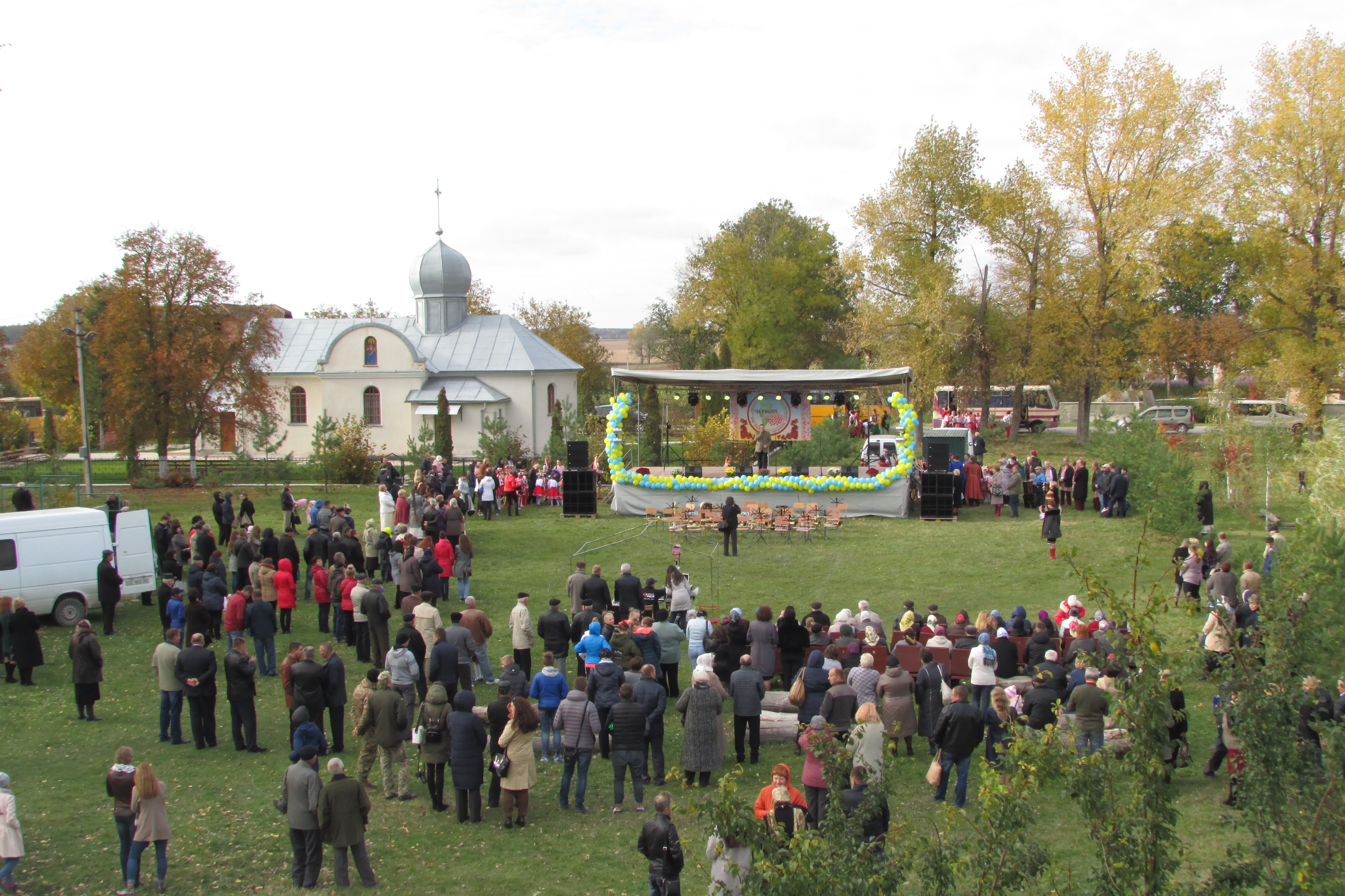 Співоче поле